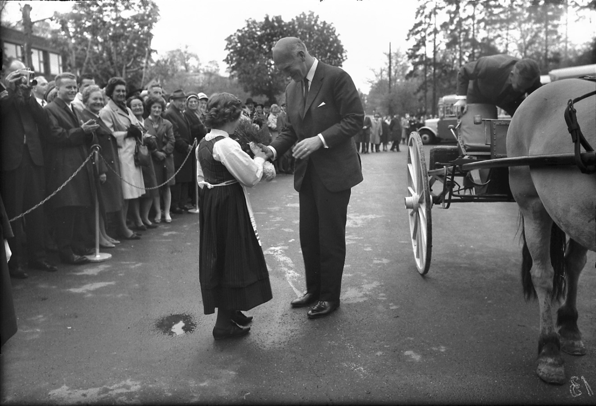 Håkon Olai Kyllingmark (1915-2003) var en norsk offiser, disponent og politiker (H). Han var både lokalpolitiker, fylkespolitiker, stortingsrepresentant i 28 år og bekledde to ulike statsrådposter på 1960-tallet: forsvarsminister og samferdselsminister. På bildet ses han på Norsk Sjøfartsmuseum i fobindelse med landsmøtet i Norges Rutebileierforbund.